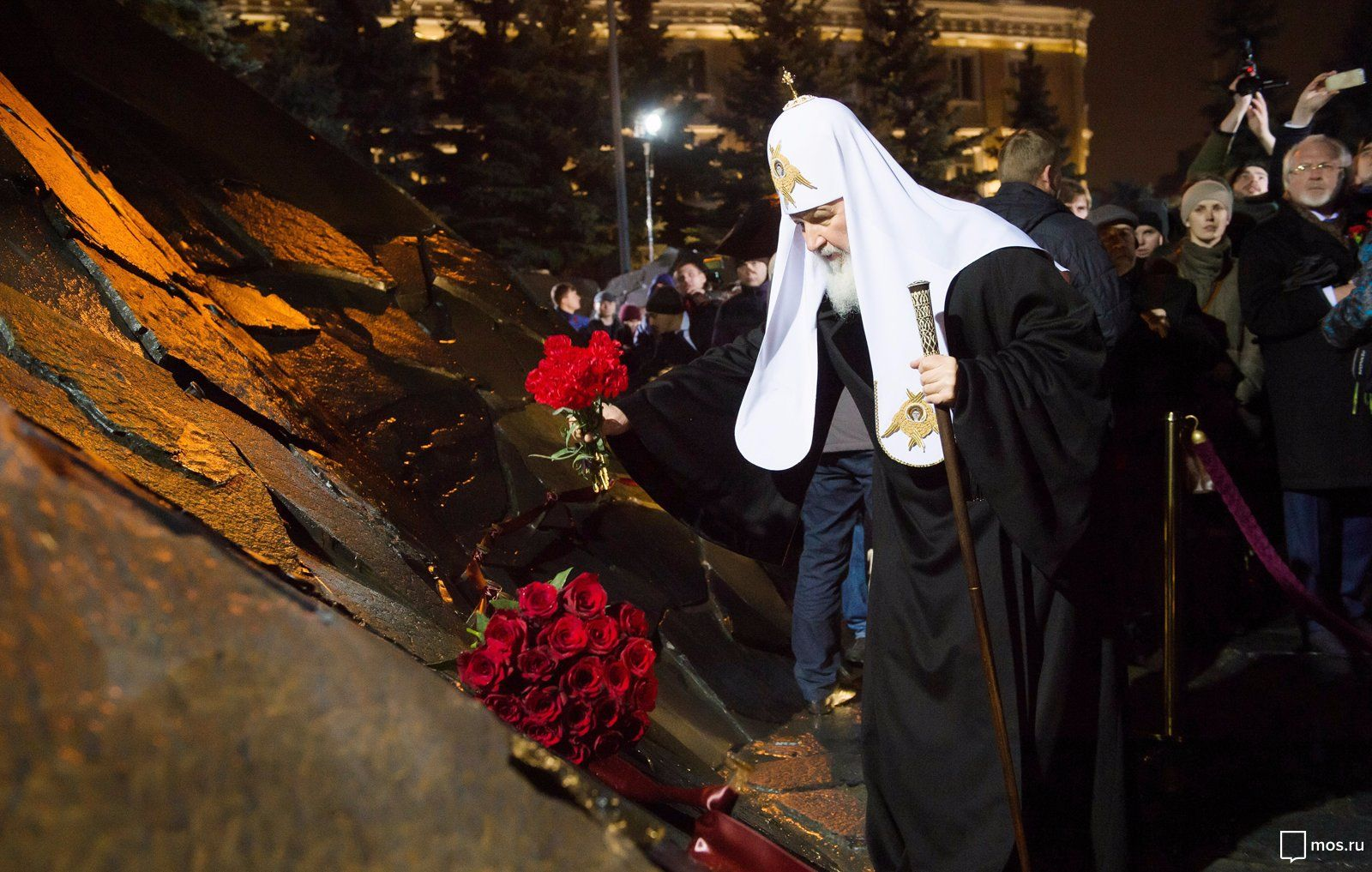 Открытие мемориала «Стена скорби»